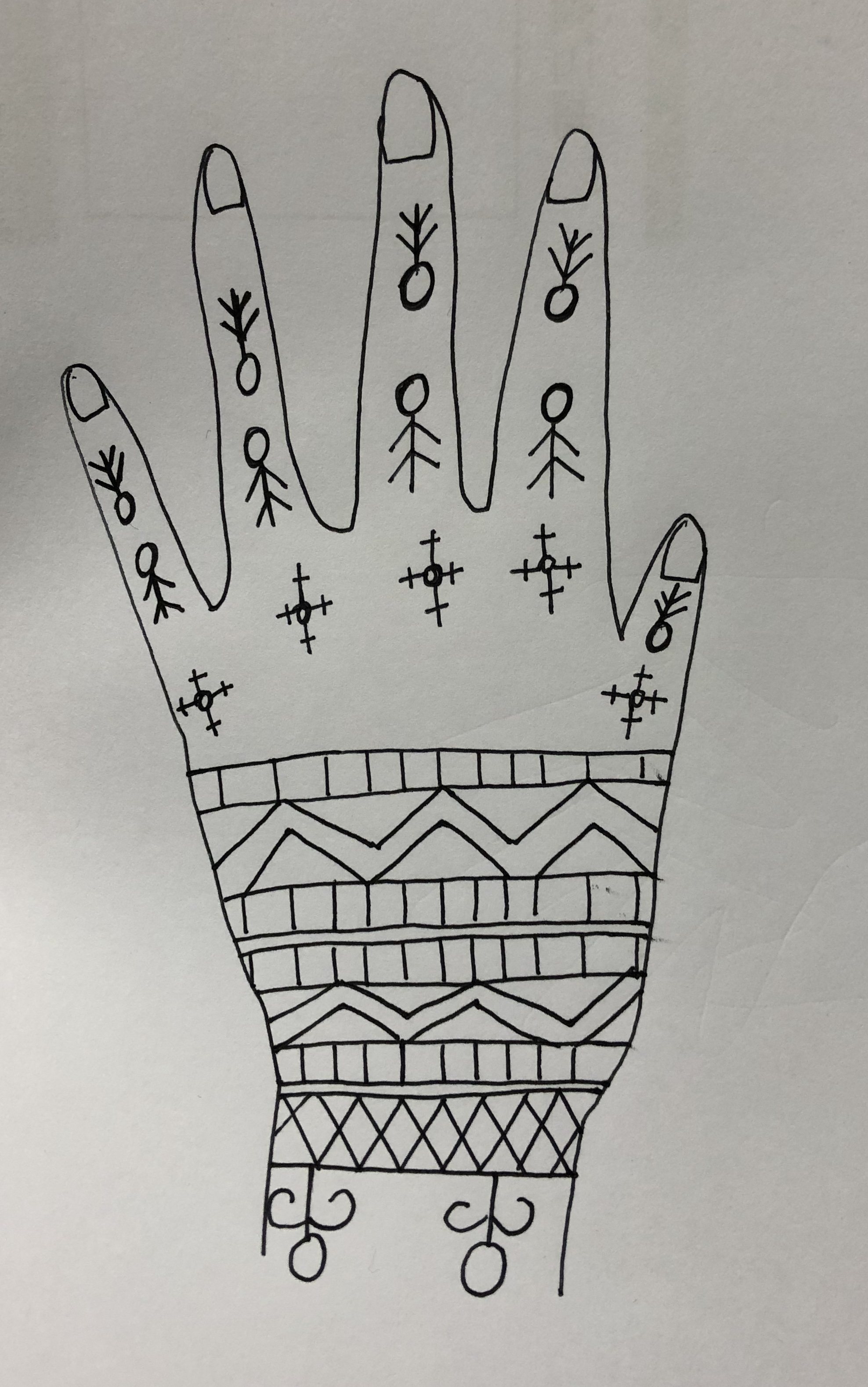 中文（台灣）: 排灣族手紋